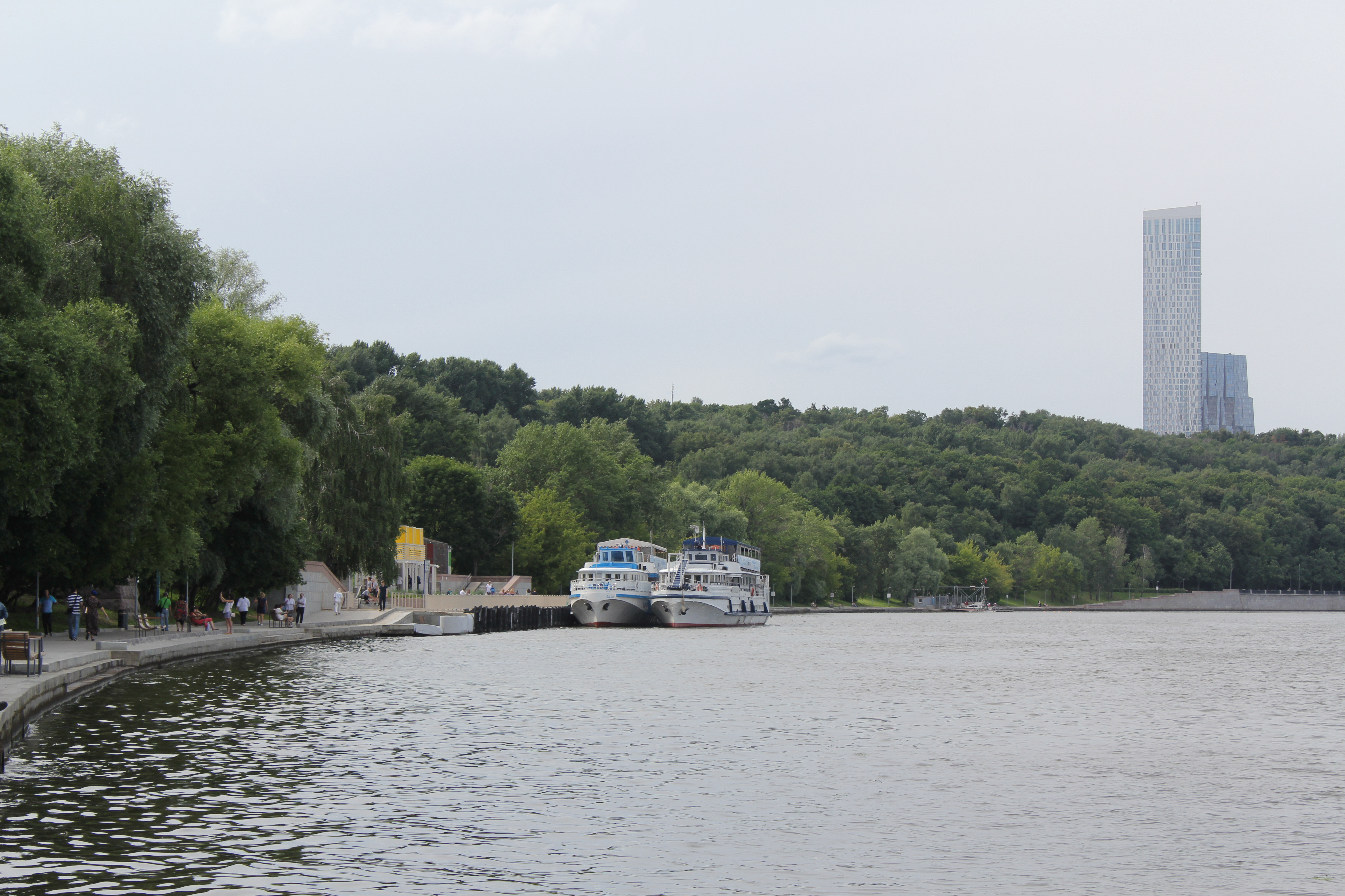 Причал Воробьевы Горы